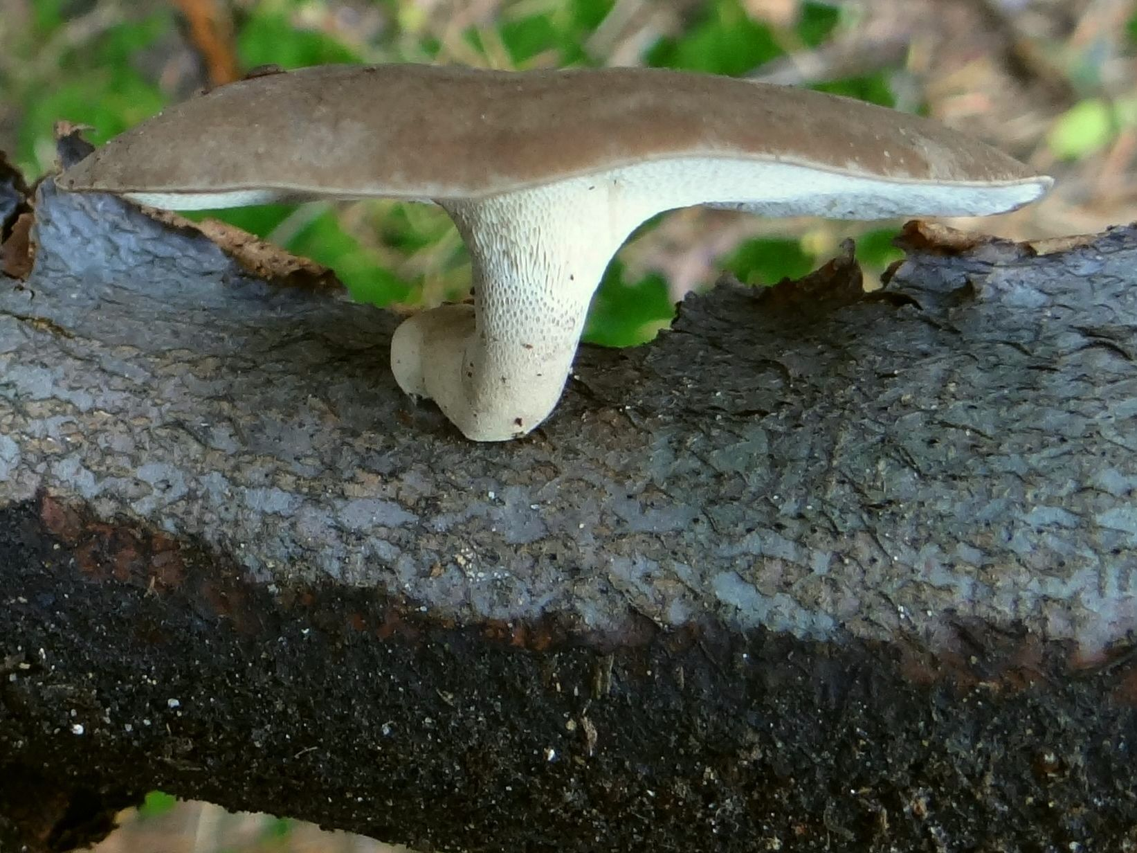 Polyporus brumalis